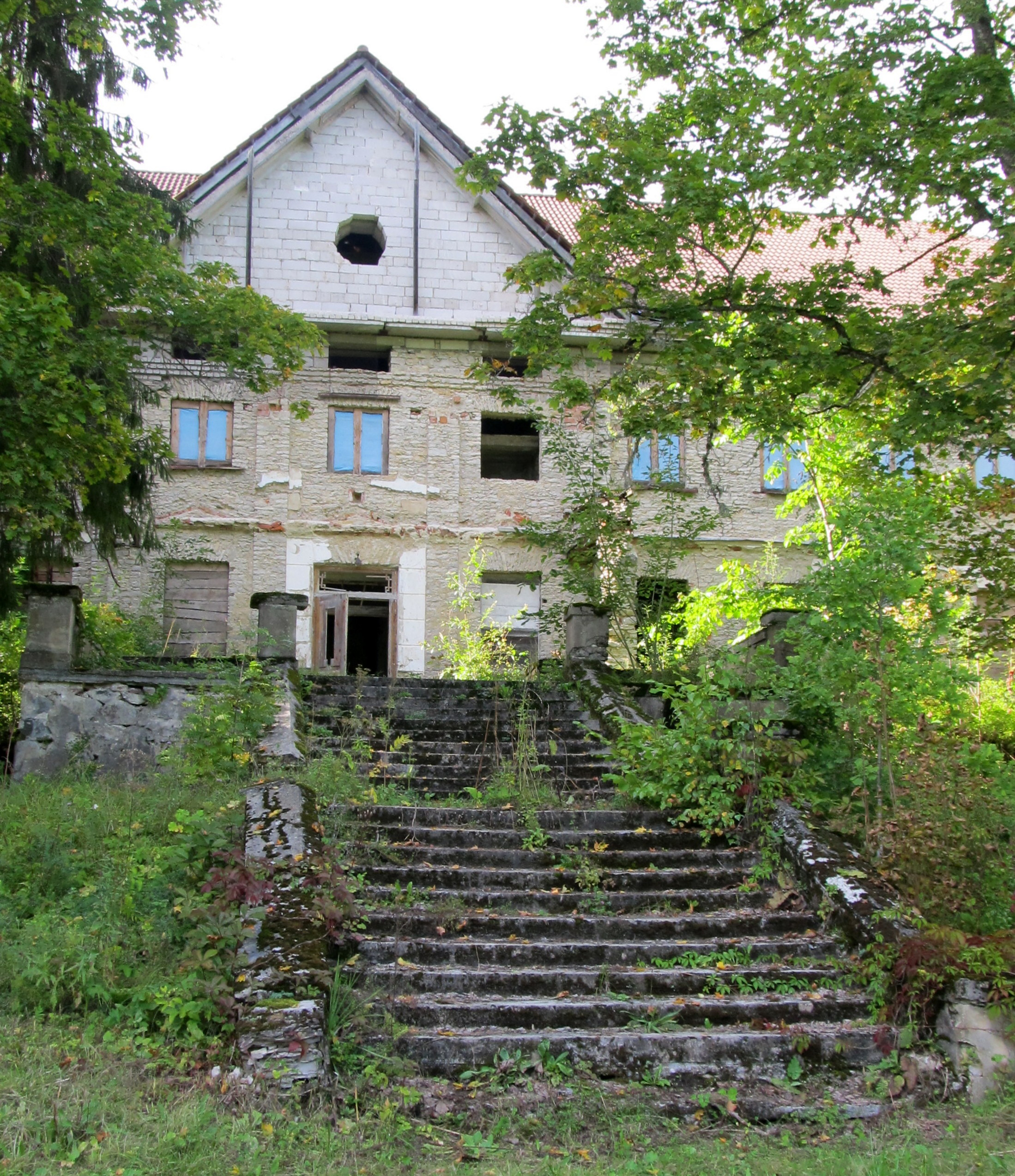 Saksi mõisa peahoone koos trepiga